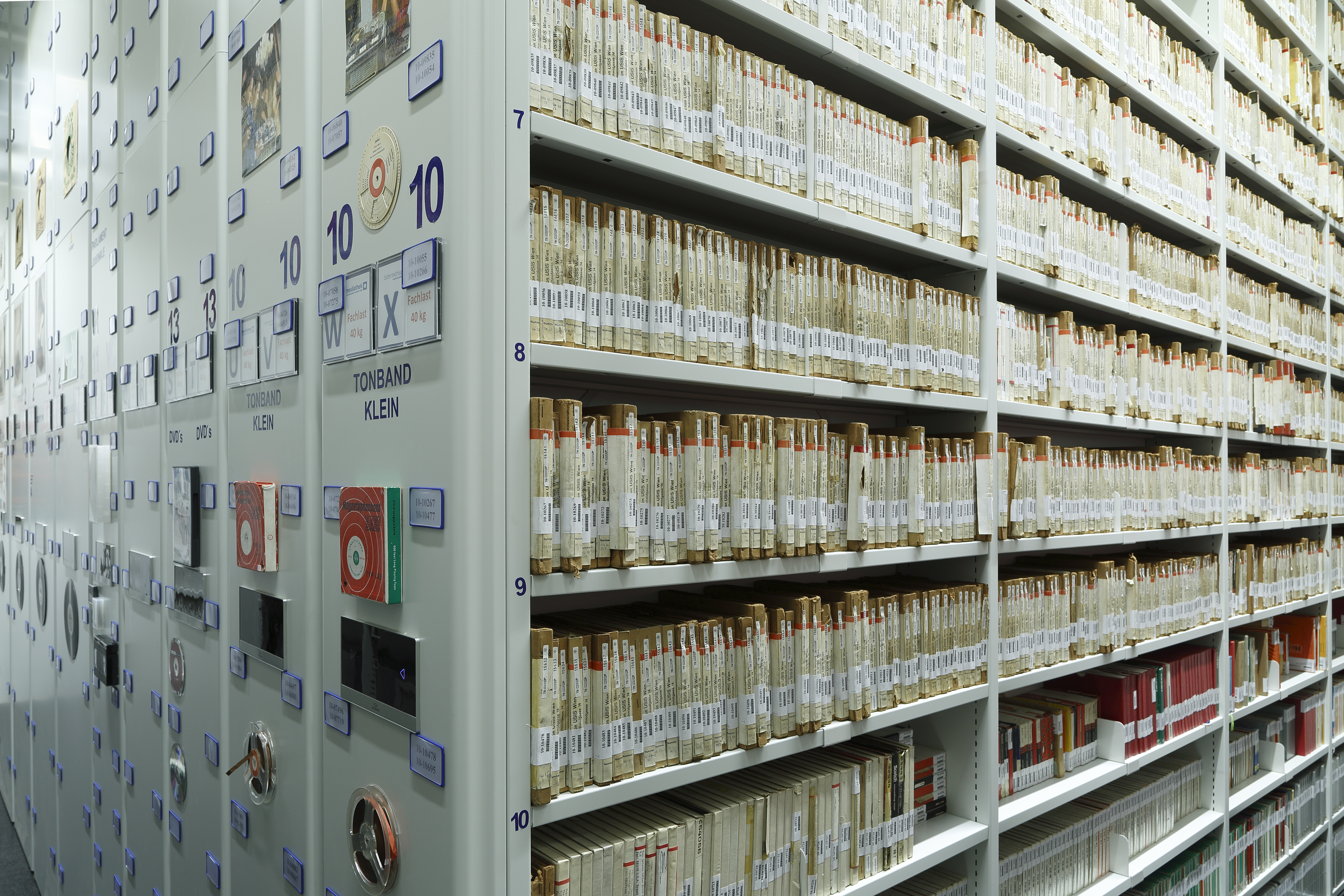 Tonbandmagazin der Österreichischen Mediathek